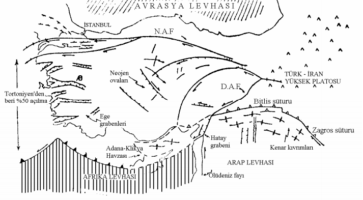 Pliyosen-Günümüz rekonstrüksiyonu